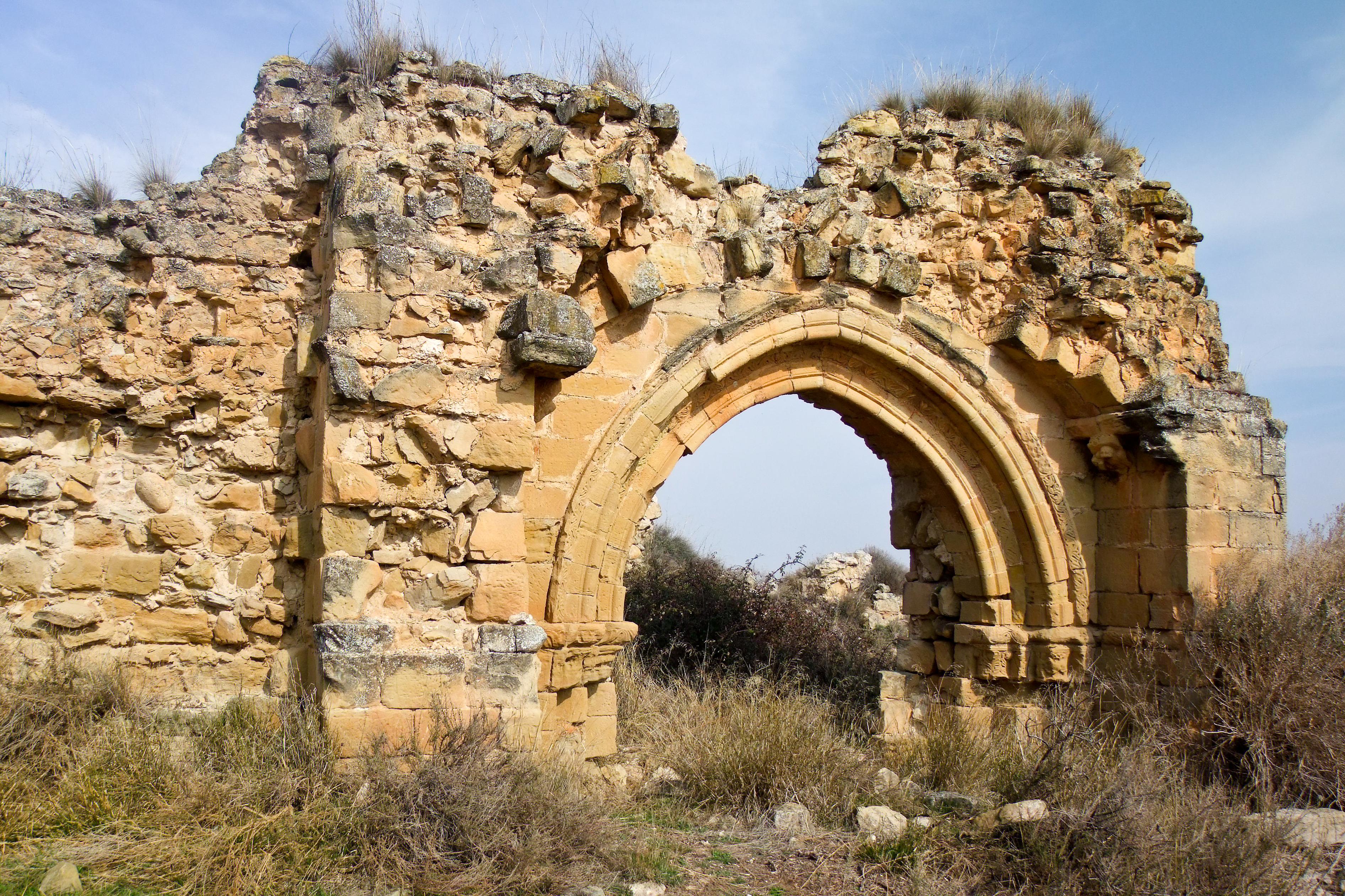 Ermita de San Vicente en la localidad de Murillo de Río Leza, La Rioja - España